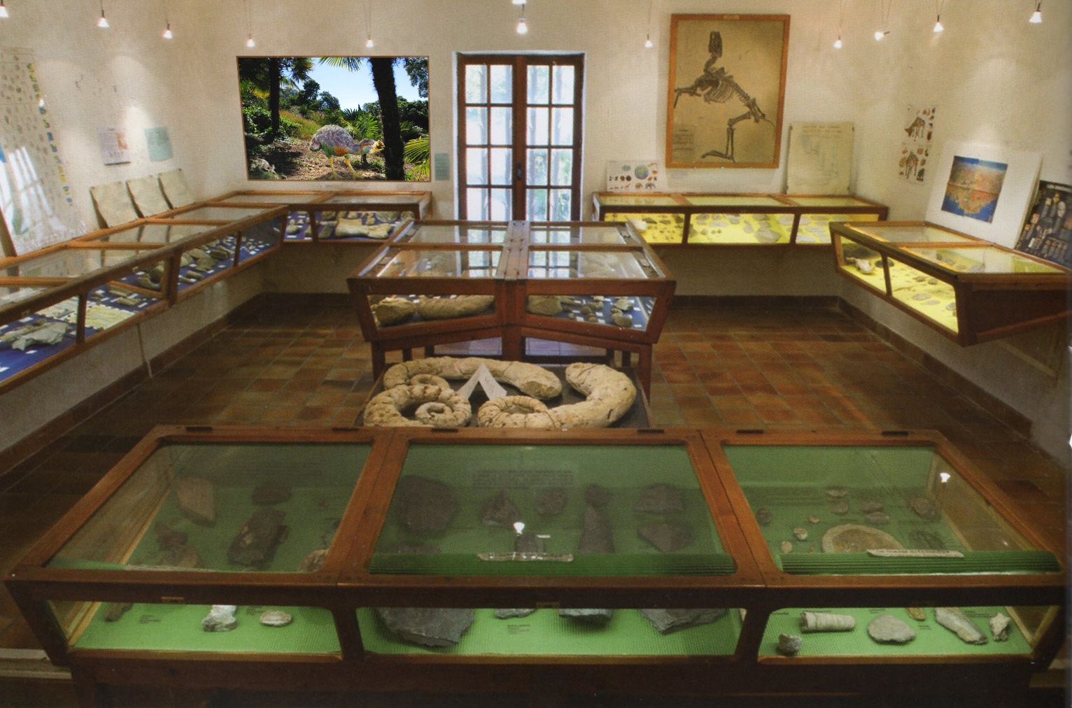 Salle du Musée des fossiles Victor Zaneboni de Tourtour, dessin Photoshop d'après la photo et avec l'accord de Brice Delahoche, Henri Ferran et la ville de Tourtour